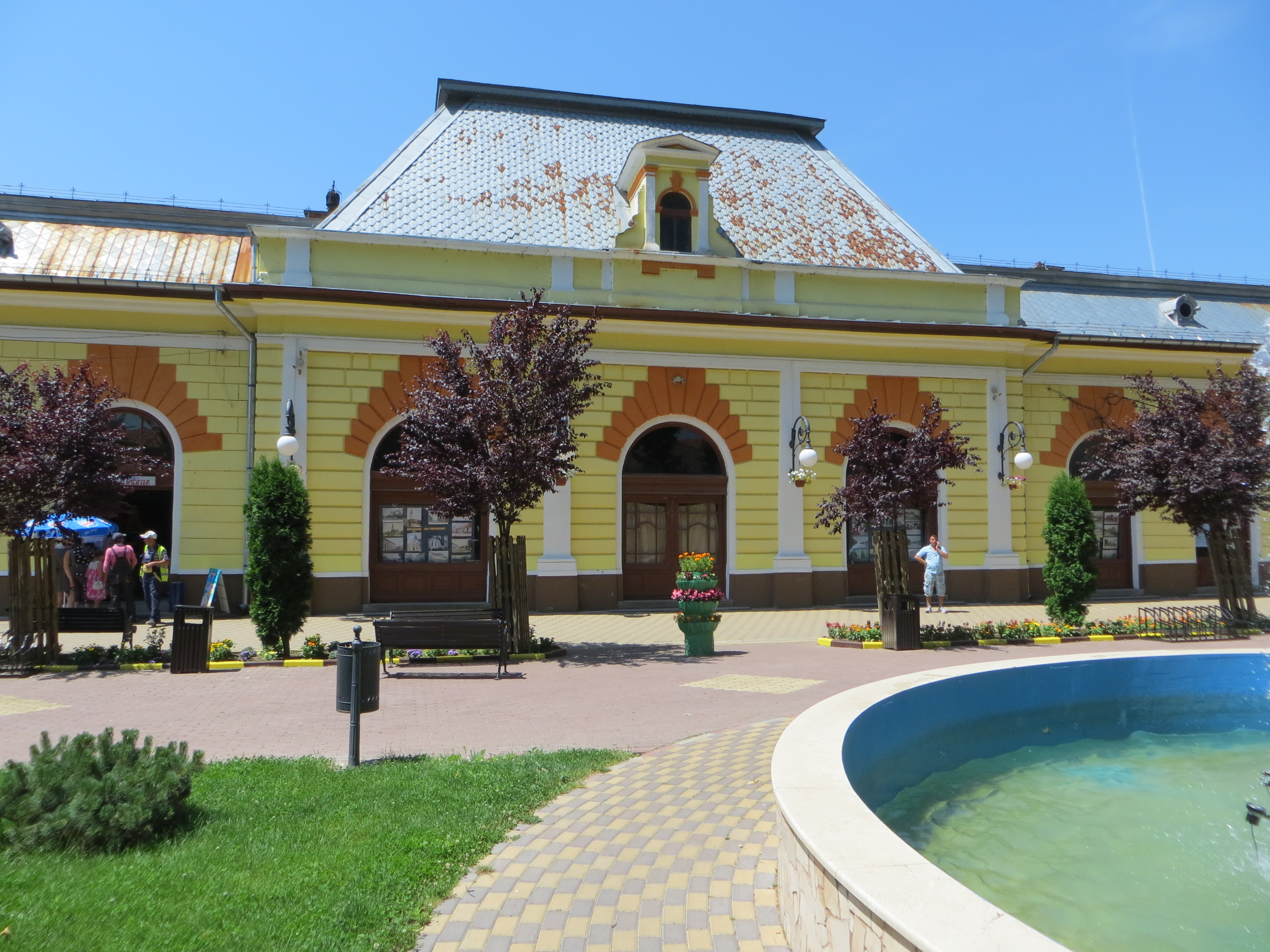 Cazinou „Cassina”